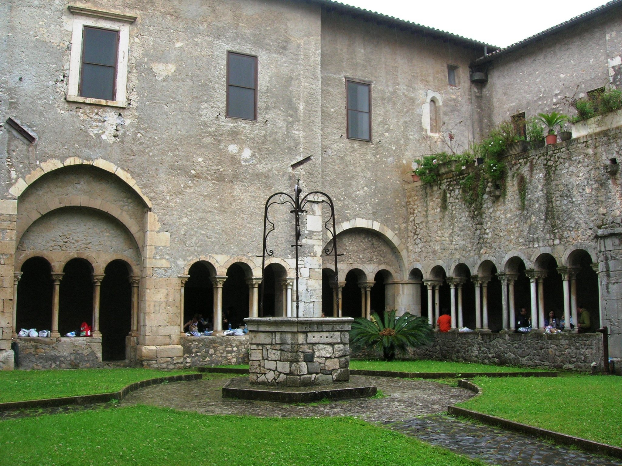 Pozzo del chiostro